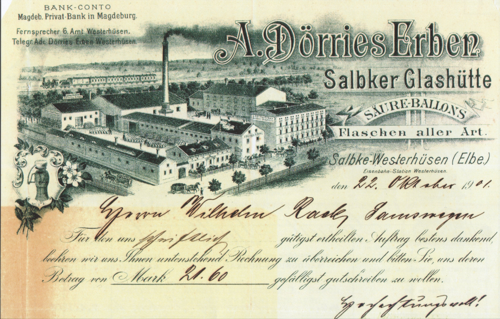 1901 verwendeter Briefkopf der Salbker Glashütte A. Dörries Erben